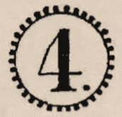 Uhrradstempel - hier Nr. 4 - waren Poststempel, die ab 1859 in Baden eingesetzt wurden.